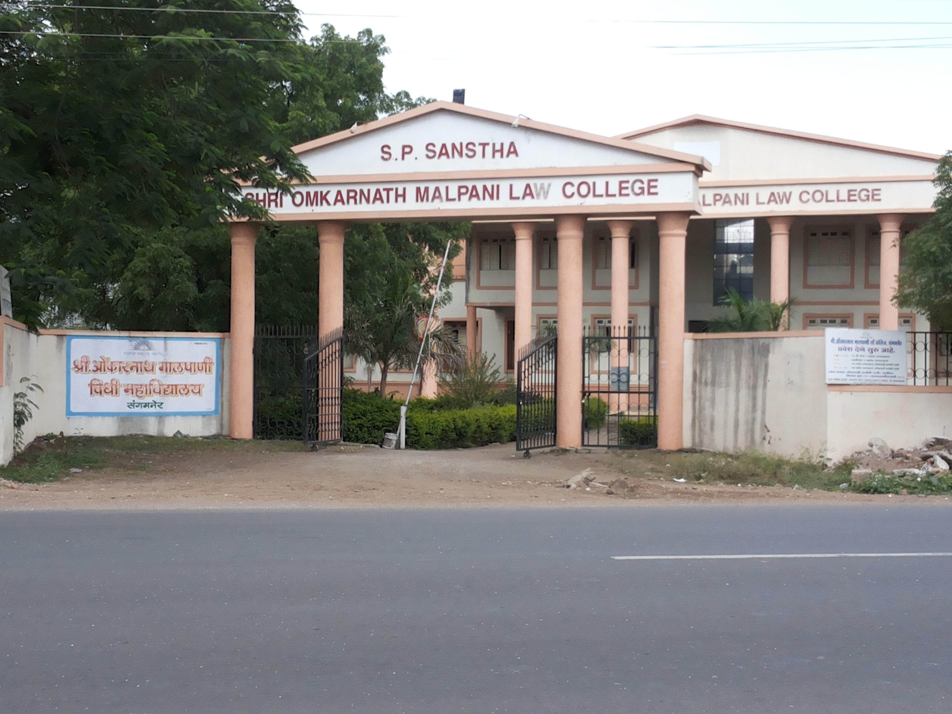 श्री ओंकारनाथ मालपाणी विधी महाविद्यालय, संगमनेर